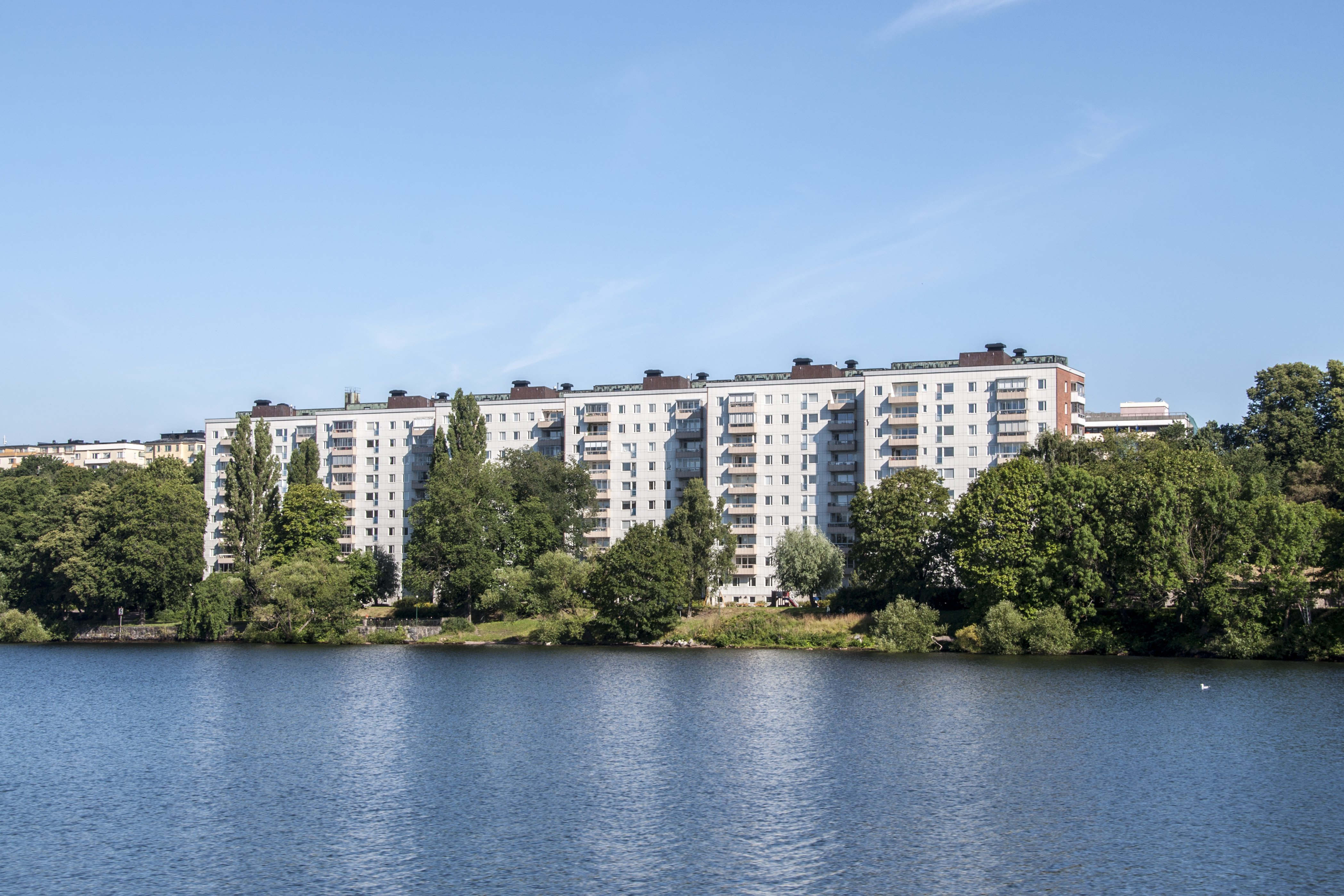 Kattuntryckeriet 1, Wivalliusgatan 11- 21 Stockholm Nybyggnadsår 1960 AB Samuelsson & Bonnier (Byggherre) Carl-Göran Dahl (Byggmästare) Gustaf Samuelsson (Arkitekt)